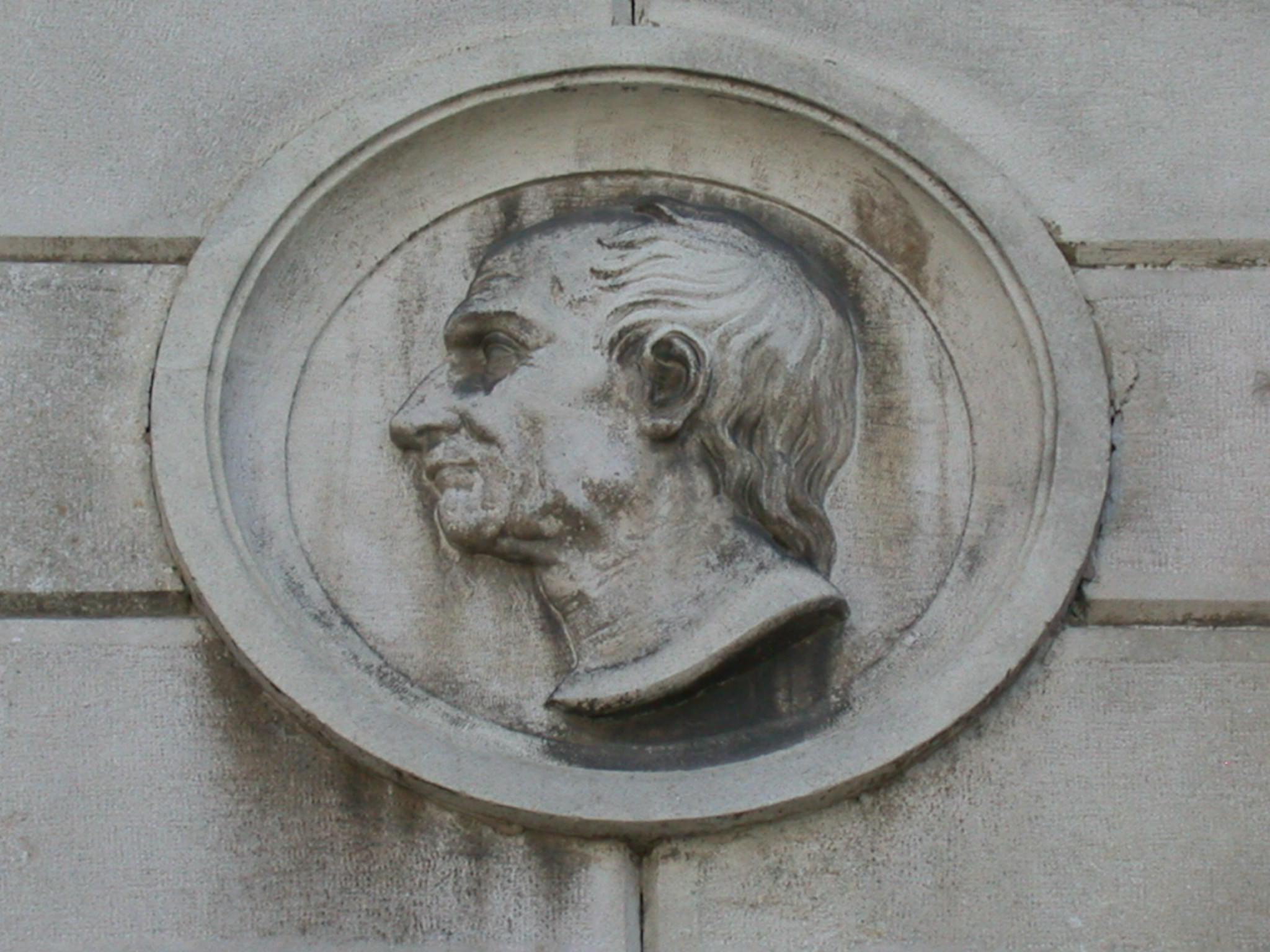 Ritratto di Antonio Foschini (architetto) al Palazzo San Crispino di Ferrara.